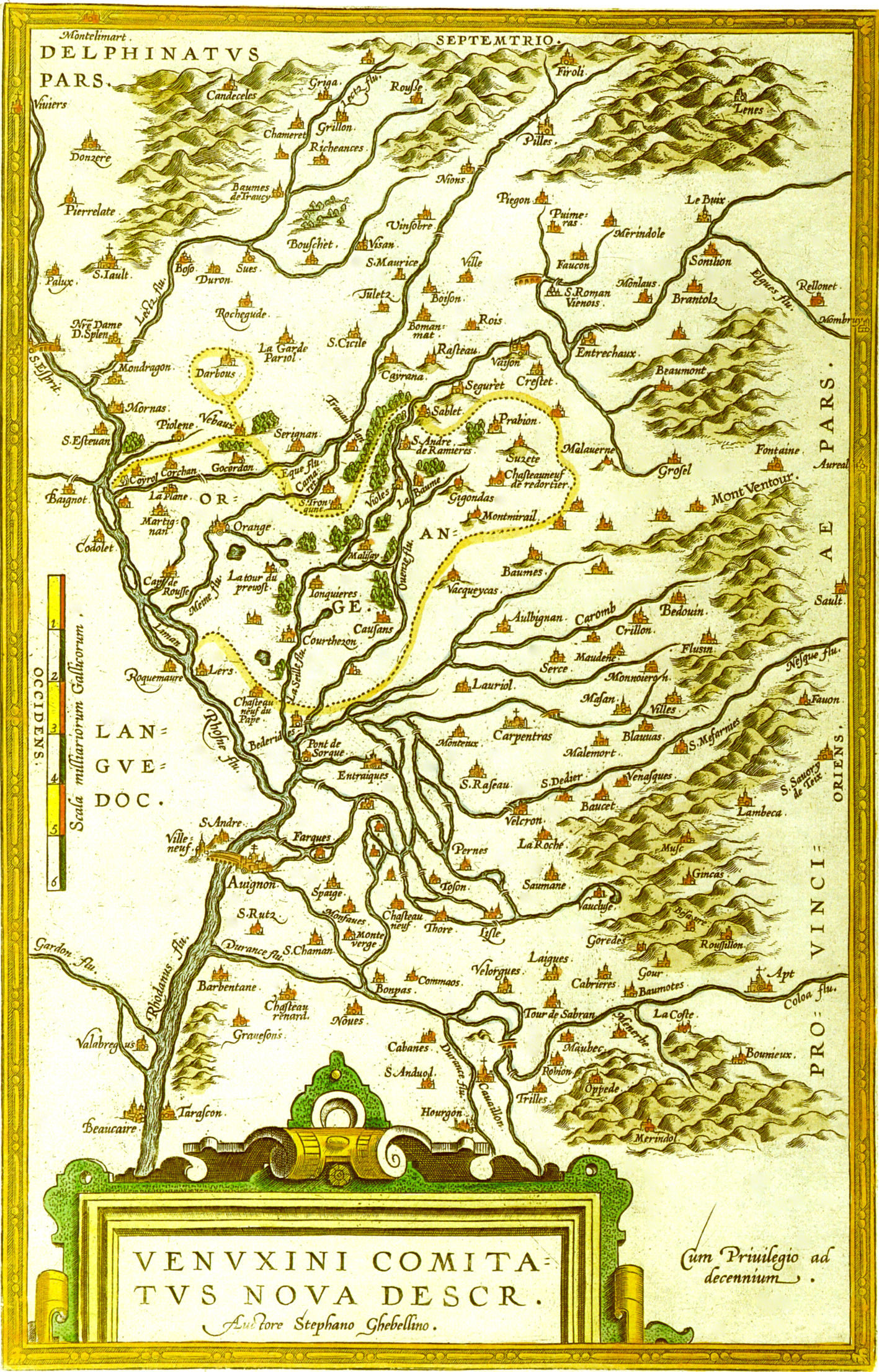 Carte du Comtat Venaissin de la fin du XVIe siècle